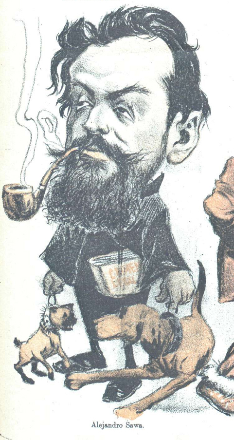 Caricatura.